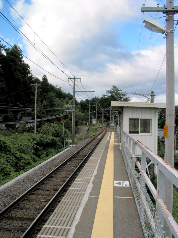 ＪＲ東海・飯田線の田切駅ホーム。下り（Ωカーブ・伊那福岡駅）方向を撮影。以前前方の左カーブにホームがあった。2006/10/07 長野県上伊那郡飯島町田切にて投稿者撮影